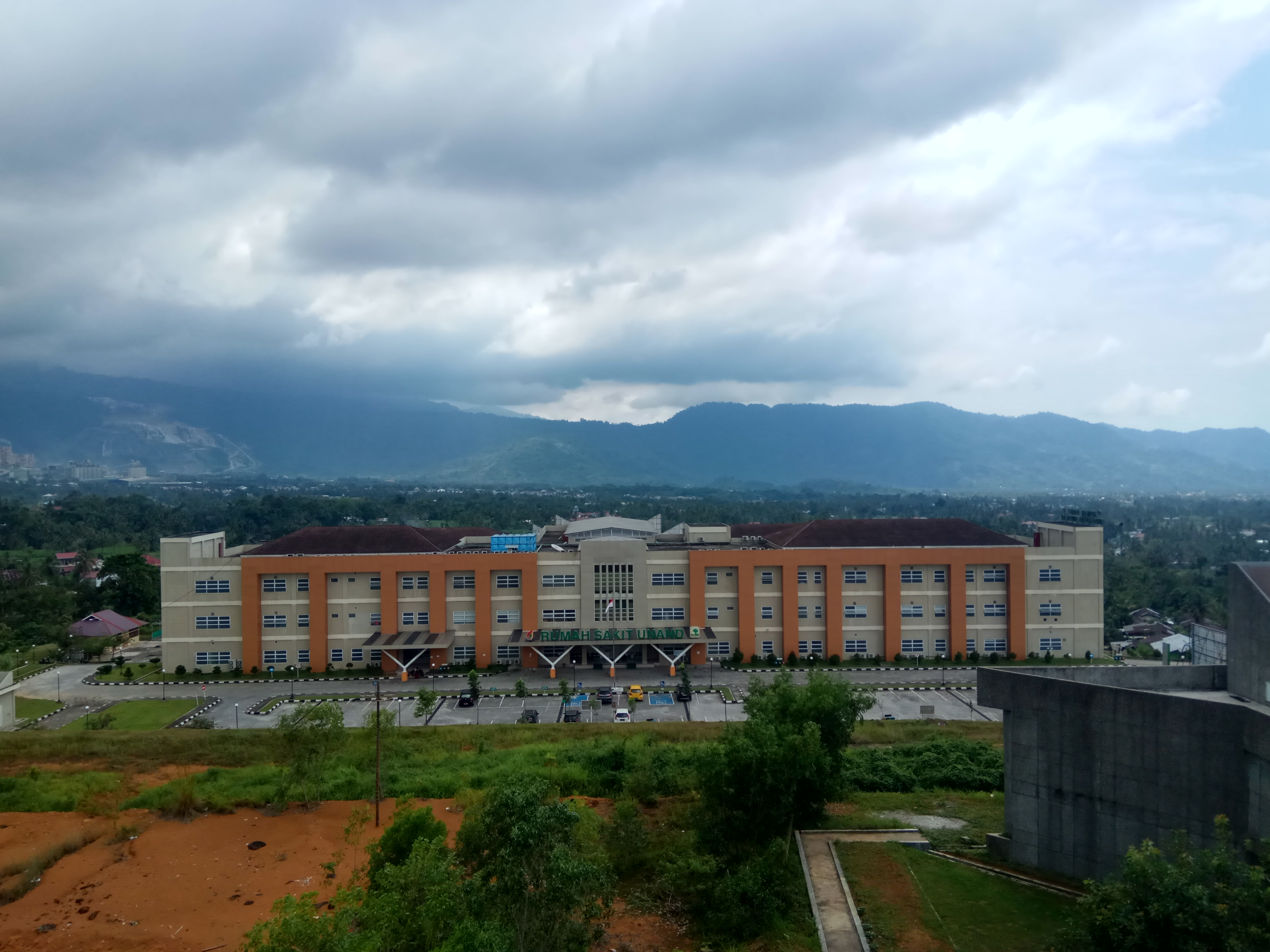 RS Universitas Andalas memiliki Laboratorium Dioagnostik dan Riset Terpadu Penyakit Infeksi tempat melakukan uji sampel pasien terpapar Covid-19